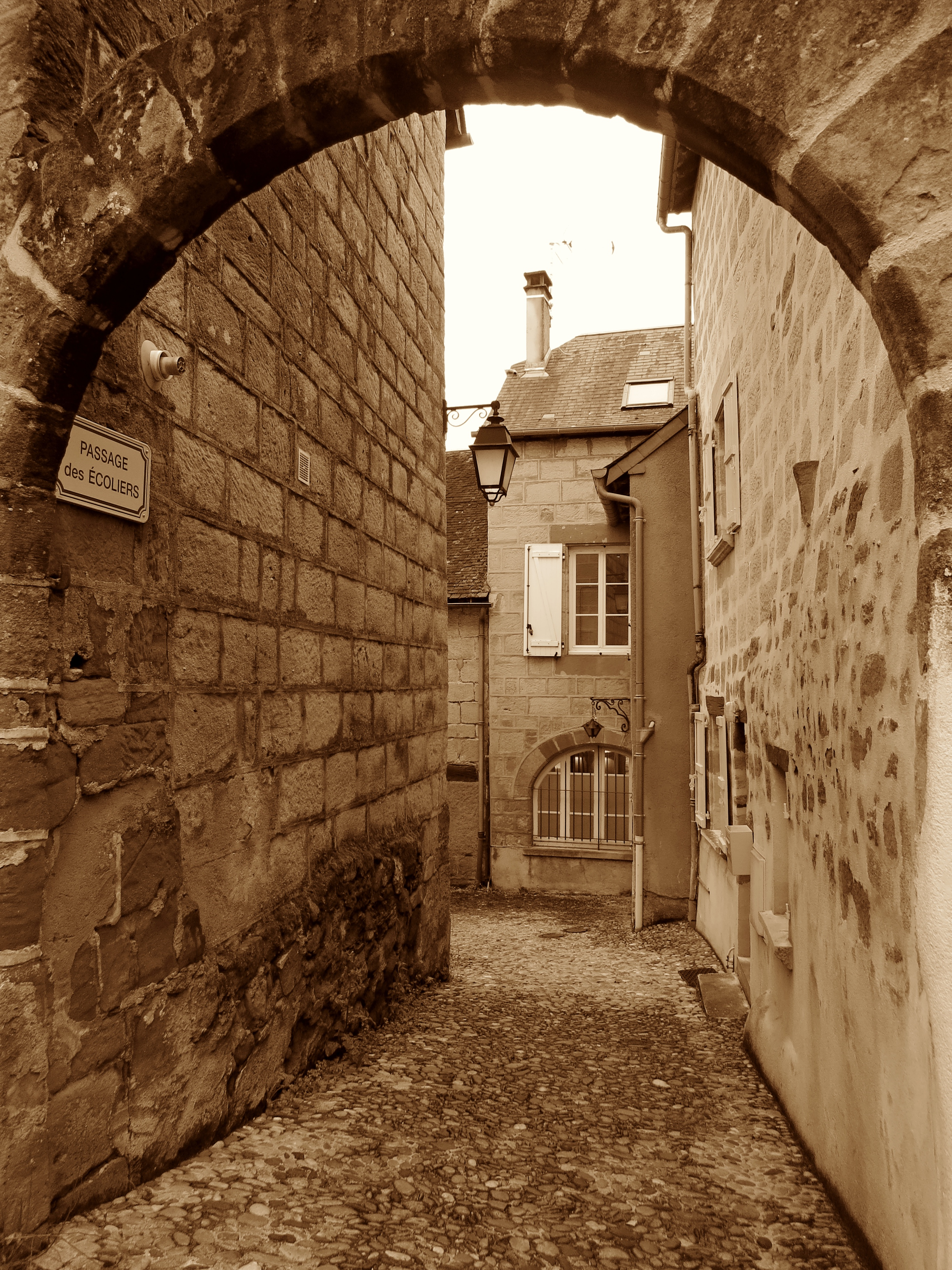 Malemort (Corrèze, Nouvelle-Aquitaine, France) - Passage des Écoliers.